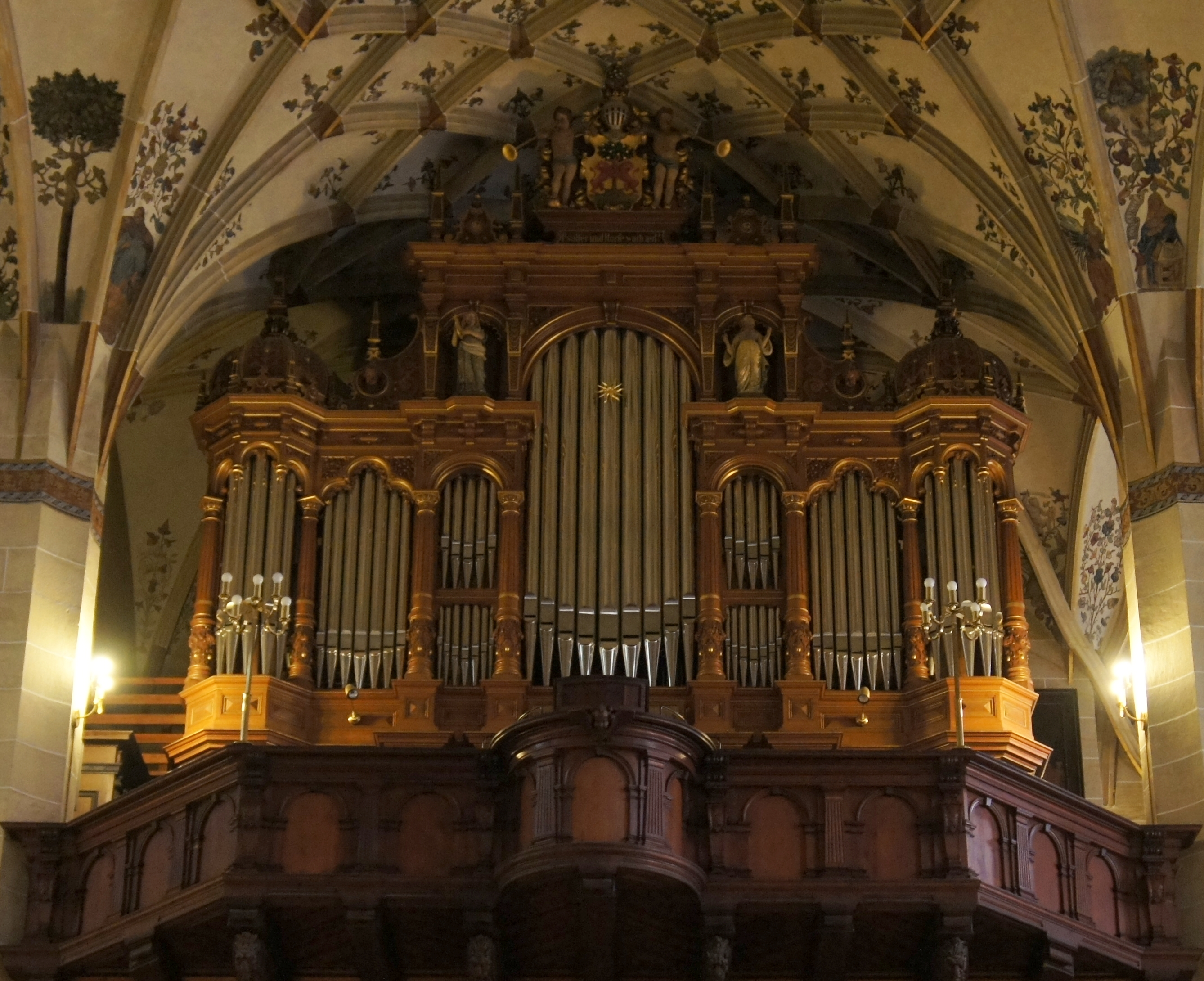 Orgel von St. Marien Pirna